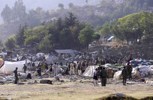 Hilfsstation für die Erdbebenopfer in Balakot, Pakistan A relief station in Balakot, Pakistan, Oct. 17, 2005, erected in the aftermath of a devastating earthquake.